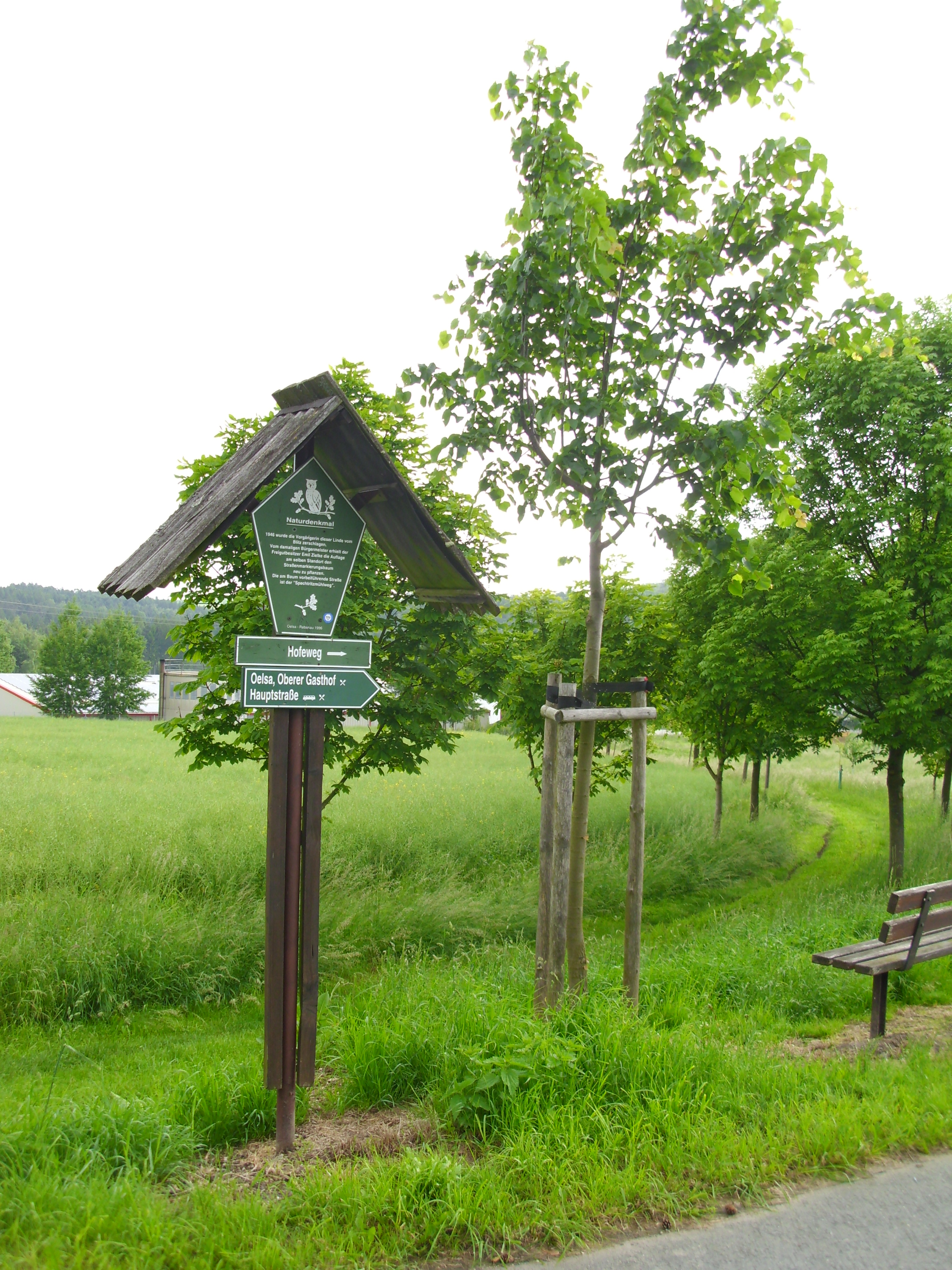 Hier stand bis 1946 ein alter Straßenmarkierungsbaum, der aber durch einen Neuen sofort ersetzt wurde durch den Freigutbesitzer Emil Zielke von Kleinoelsa. Seit 2013 steht hier erneut ein neuer Baum.